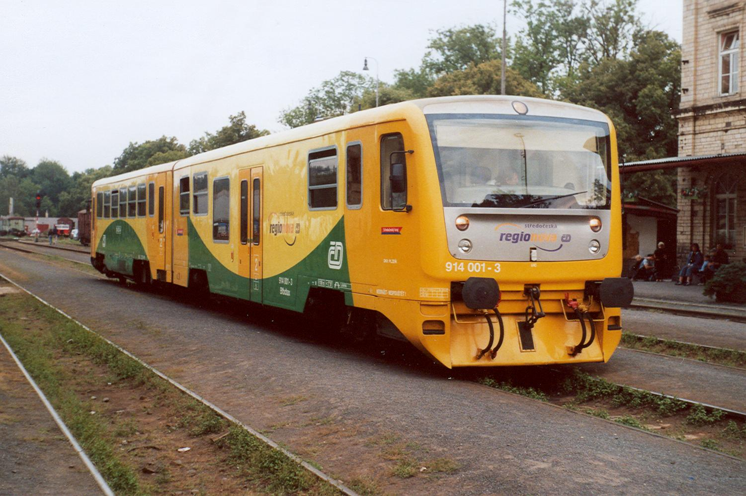 Řídicí vúz 914.001-3 (upravený pro Středočeský kraj) ve stanici Lužná u Rakovníka.